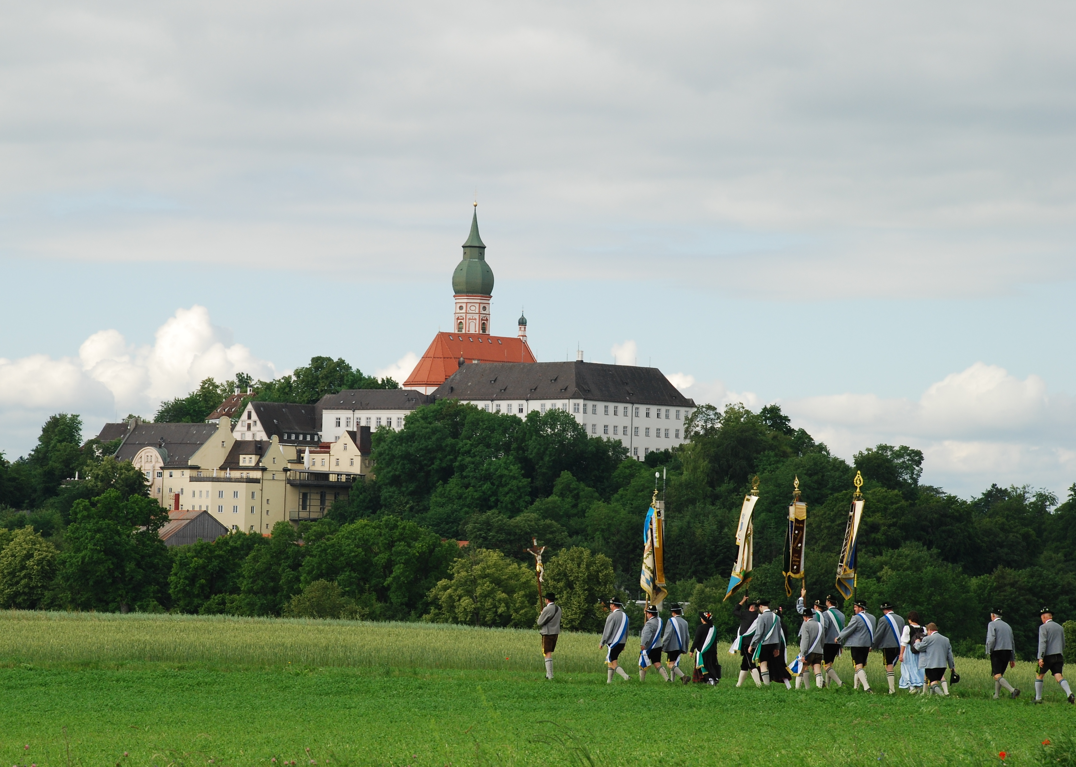 Wallfahrer auf dem Weg zum Kloster Andechs